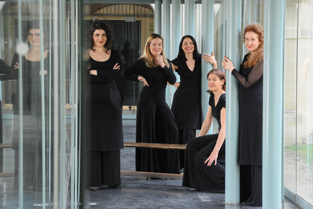 Photo de l'ensemble De Caelis